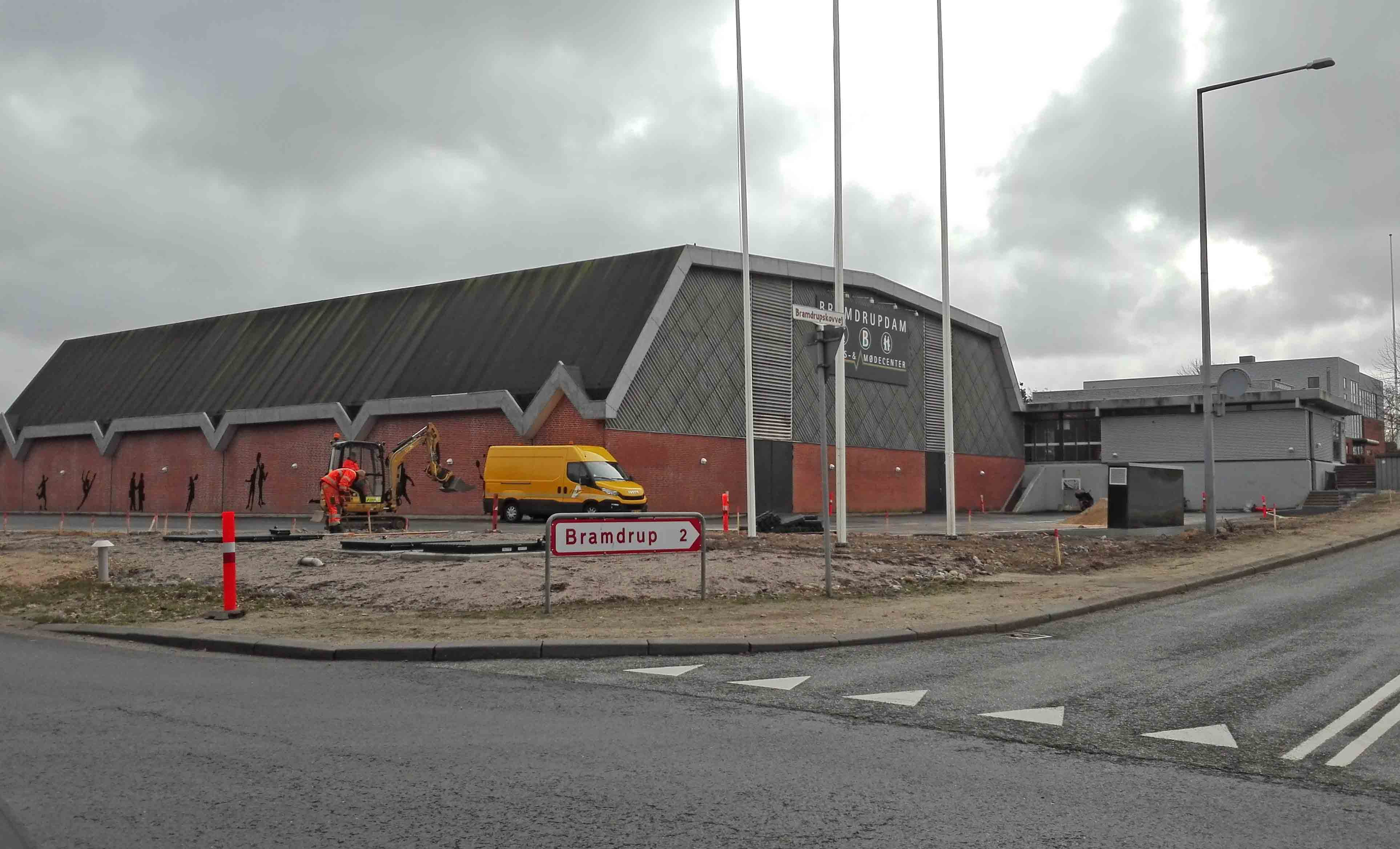 Bramdrupdam Sports- og Mødecenter